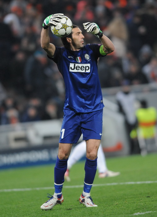 Buffon Prende con la palla in Mano